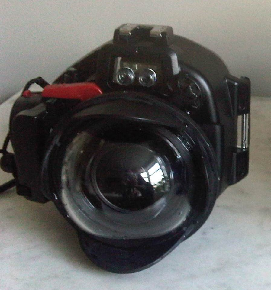 Olympus camera met mini-dome